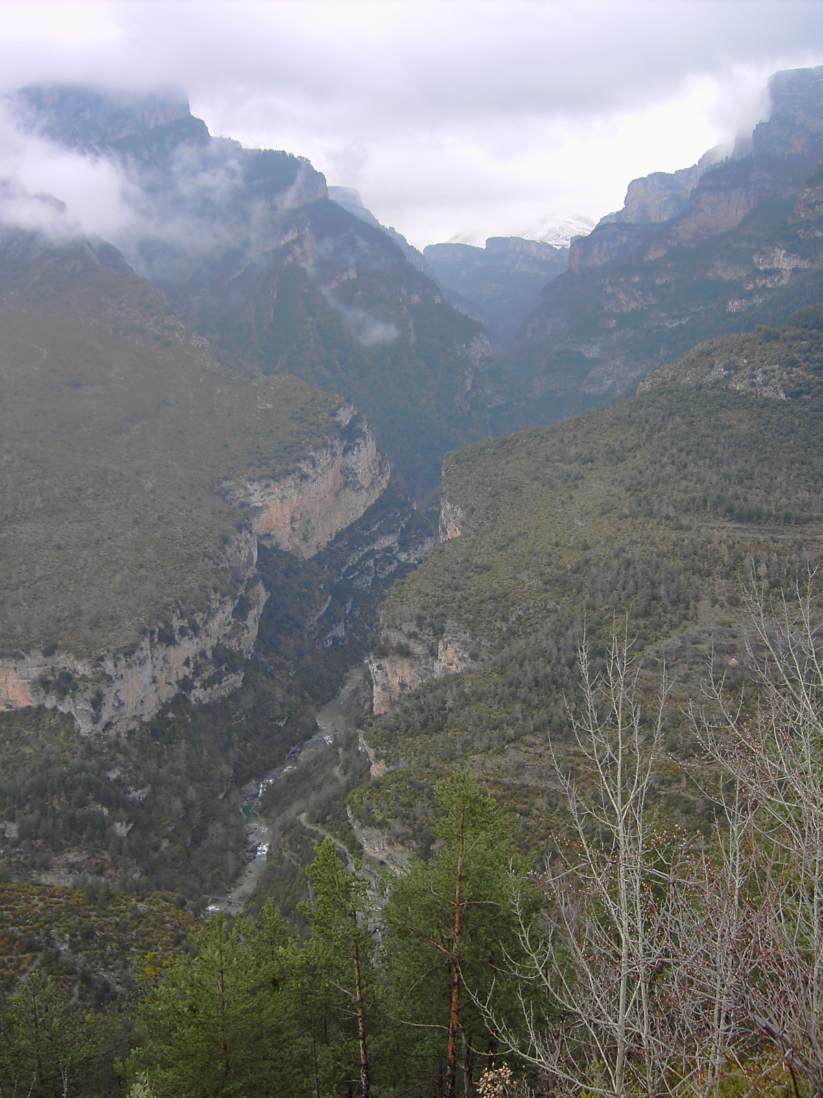 Cañón de Añisclo, en concreto el paraje conocido como "Portiello de Sercuet" visto desde la Valle de Bió, en concreto desde el paraje conocido como As Fuebas.